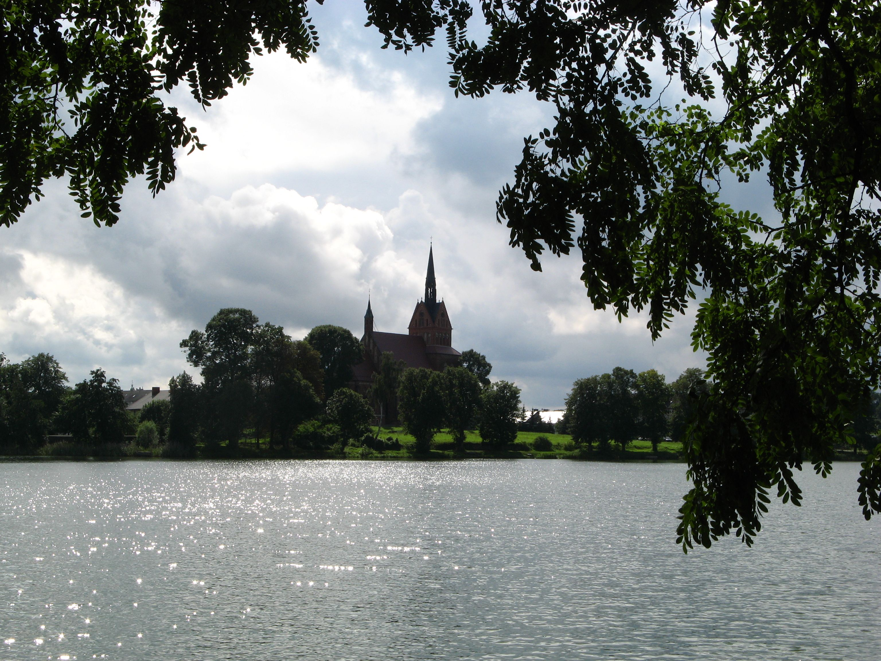 Przez jezioro